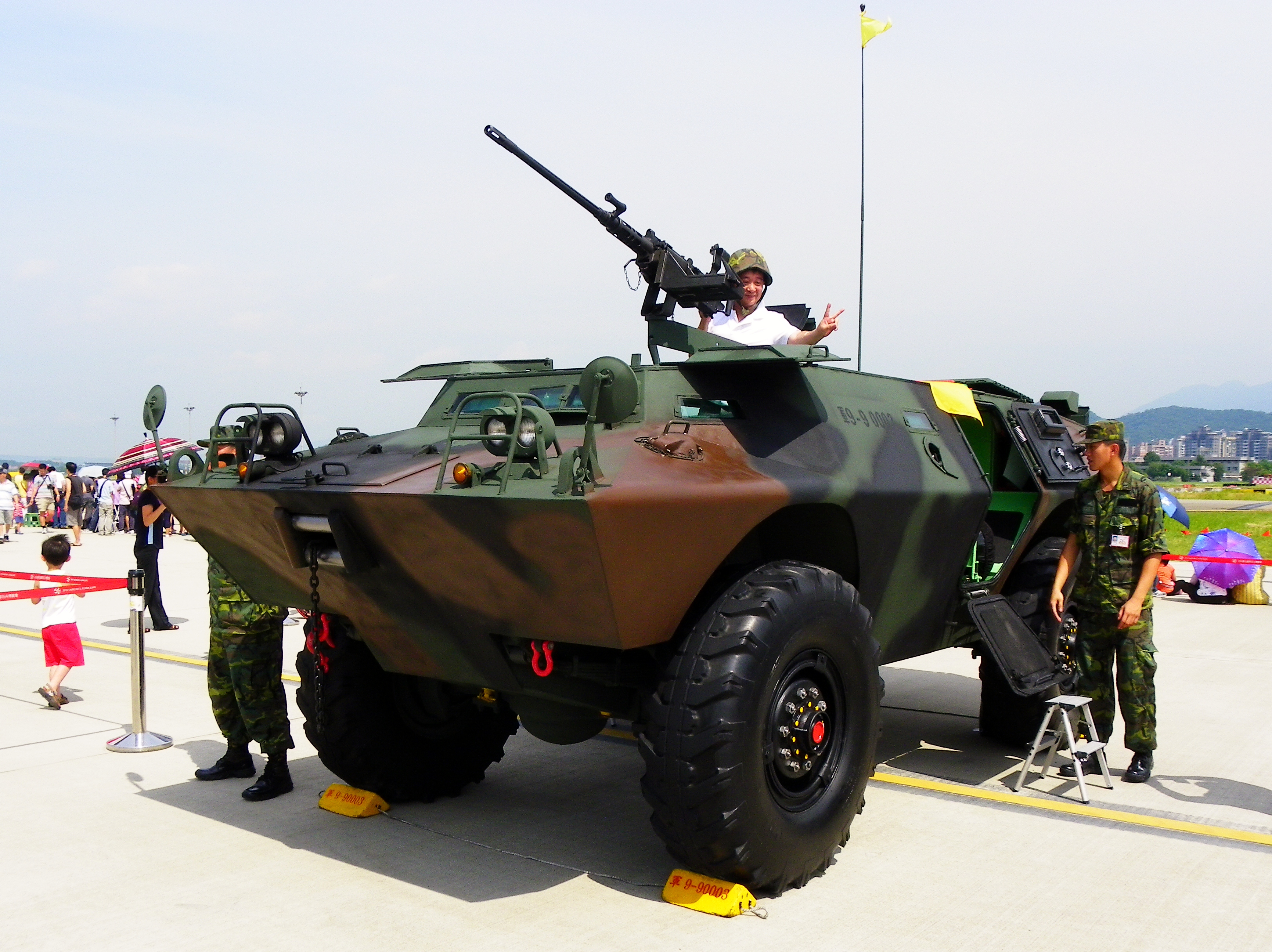 開放遊客試乘的中華民國陸軍V-150S裝甲車，攝於2011年8月13日空軍松山基地營區開放活動。